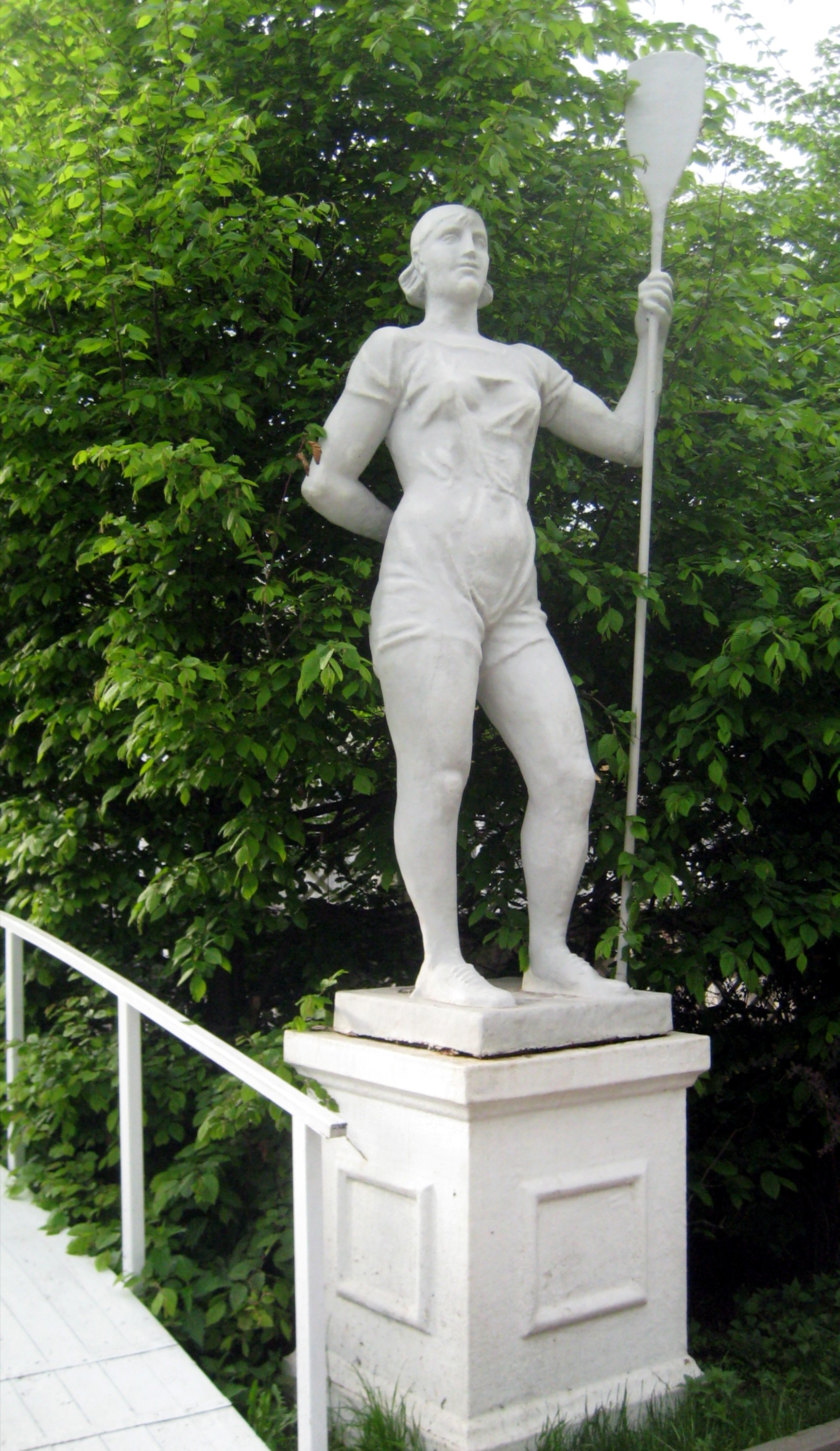 Девушка с веслом. Парк Горького. Girl with oar, Gorky park